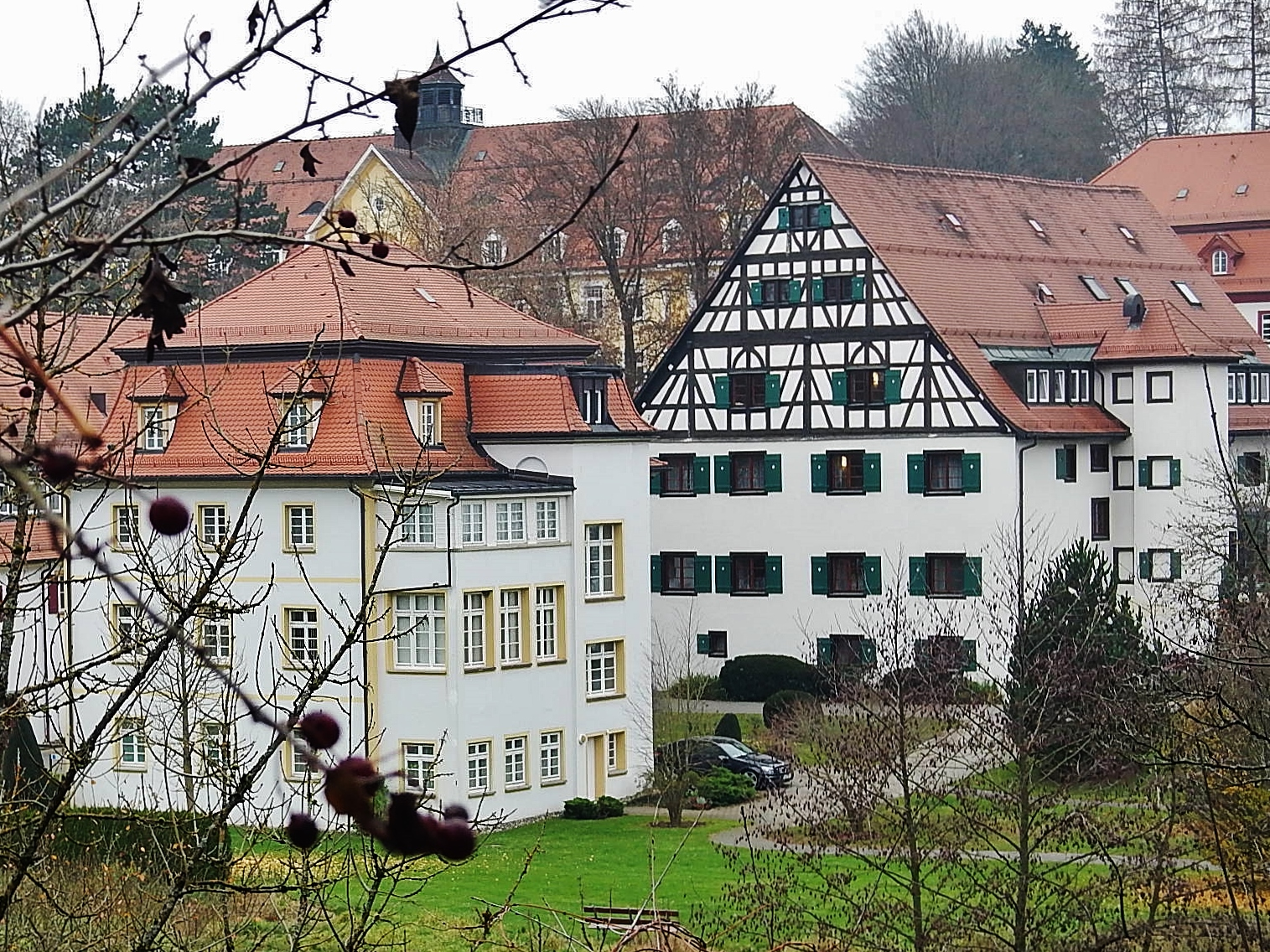 Beim 366 km langen Neckartalradweg: Vinzenz von Paul Hospital